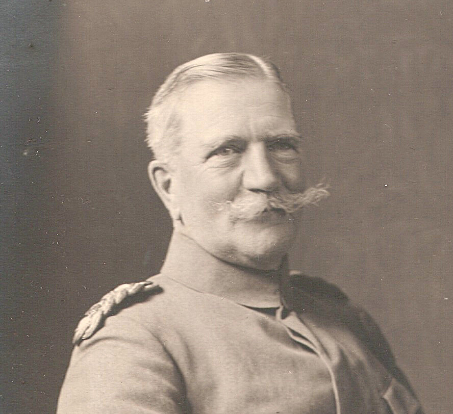 Adolf v. Deines, Aufnahme während seiner Zeit als kommandierender General des VIII. AK